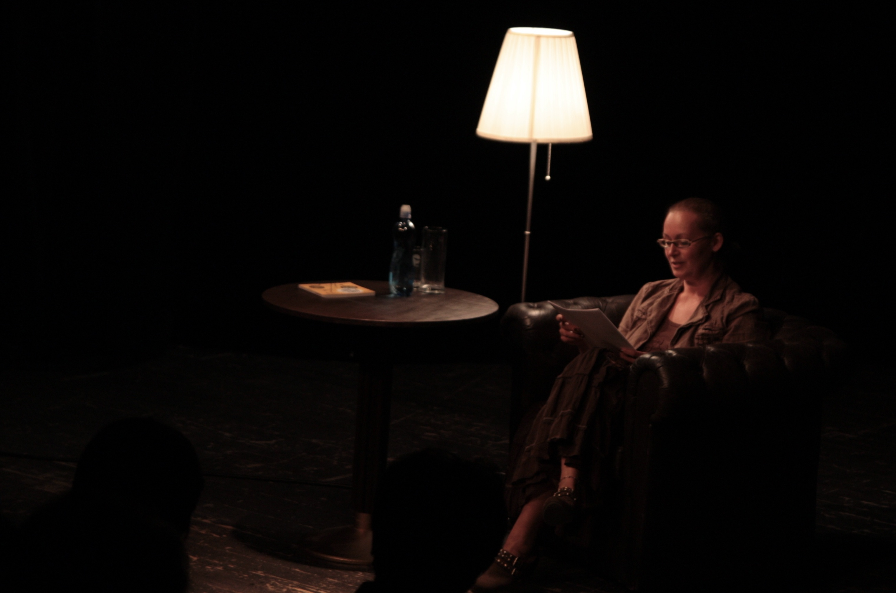 Zuzana Slavíková